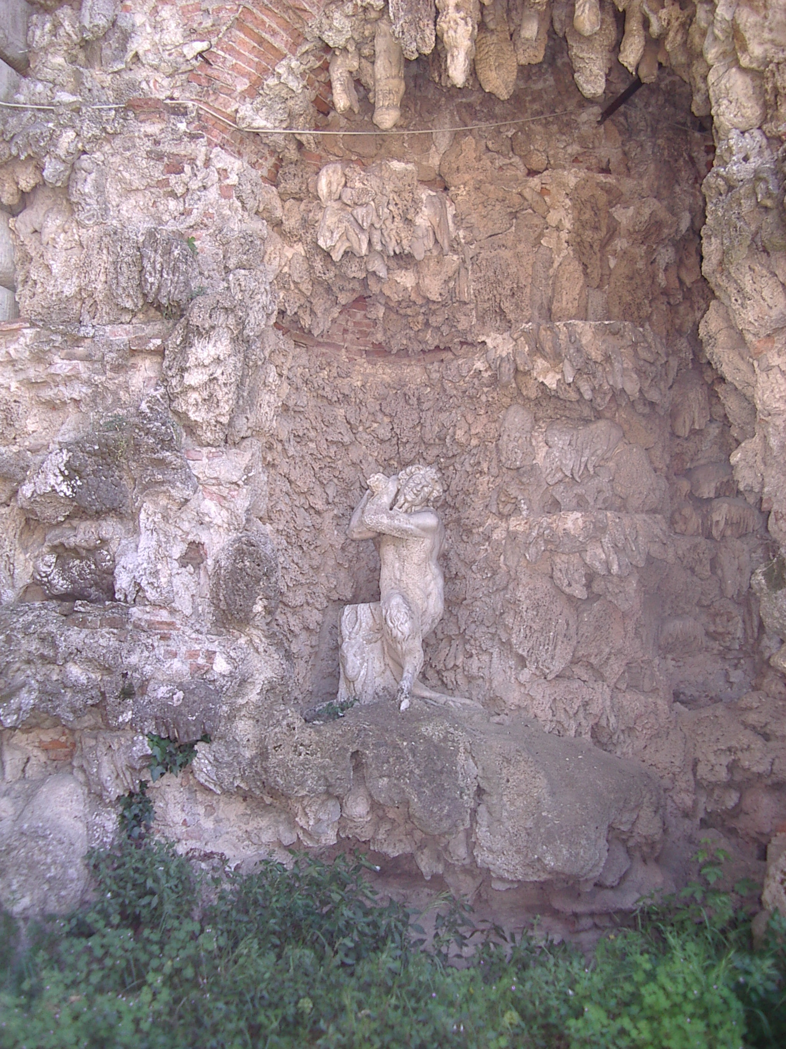 Città di Castello Palazzo Vitelli Ombrie Italy